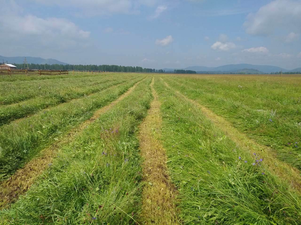 Freshly cut hay in alpine meadows in the mountainous region of Buryatia